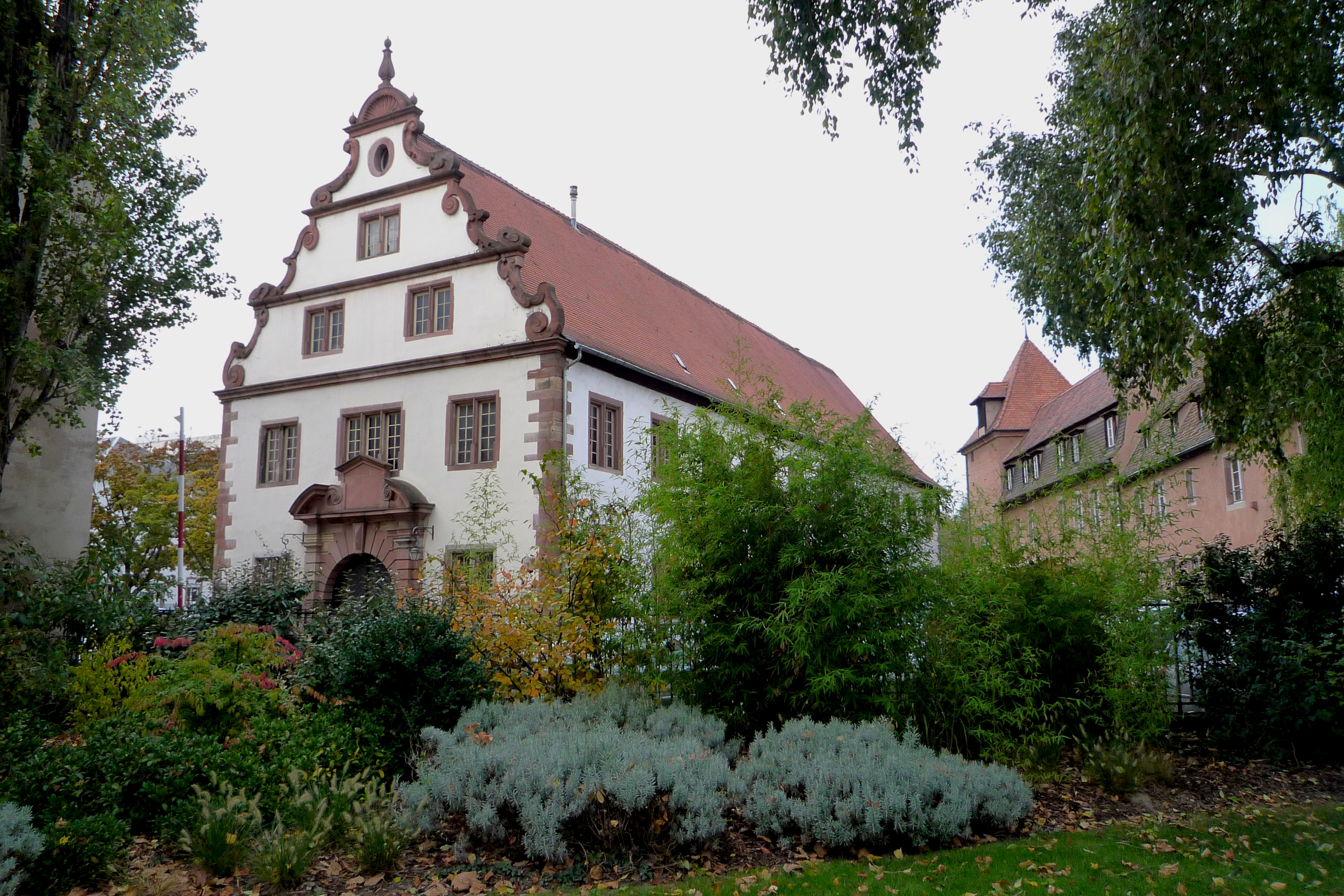 Construit en 1642, comme l'indique une date mutilée, le bâtiment protégé, en plan rectangulaire, fut légèrement transformé pour recevoir les pièces d'artillerie qui venaient d'être fondues. Son pignon principal, à trois étages, percé d'un portail à fronton, est orné d'enroulements ajoutés au 18e siècle. La fonderie était installée à l'emplacement de l'ancien arsenal de la ville de Strasbourg constitué à partir de 1430 derrière le mur d'enceinte du 13e siècle, elle utilisait les bâtiments d'un couvent de Clarisses et une partie des fortifications urbaines. La bâtisse a servi de synagogue provisoire place Broglie entre 1948 et 1958. Source : Base Mérimée